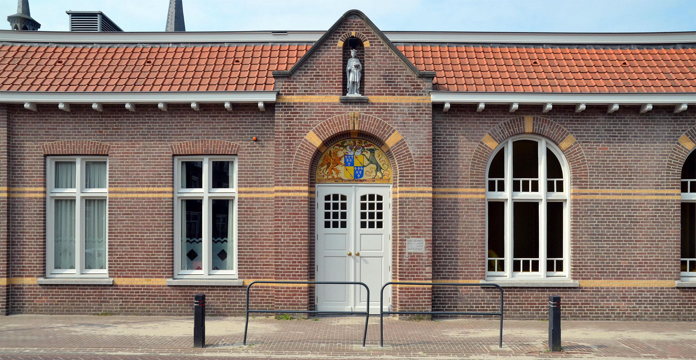 Rijksmonument te Mierlo, Nederland. Voormalig Patronaat, Heer van Scherpenzeelweg 14, Mierlo